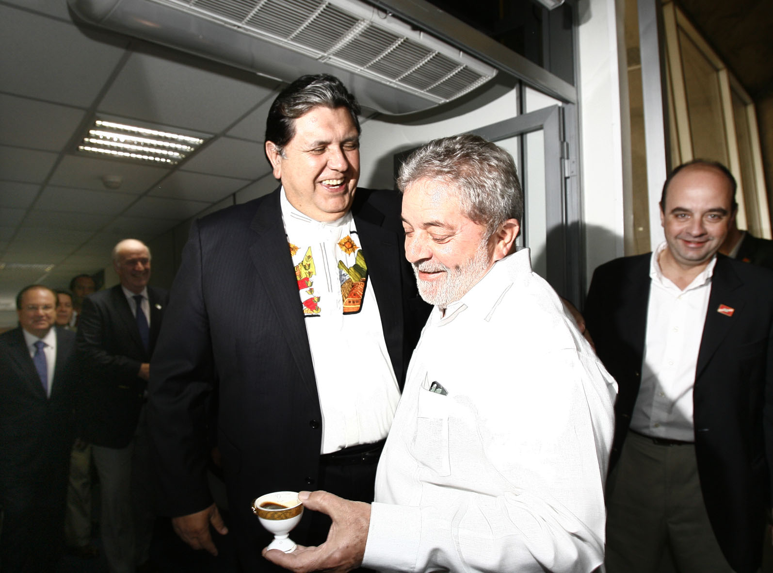 Presidentes Alan García de Perú y Luiz Inácio Lula da Silva de Brasil durante encuentro en Manaos. Acompaña el Canciller José A. García Belaunde (ANDINA)